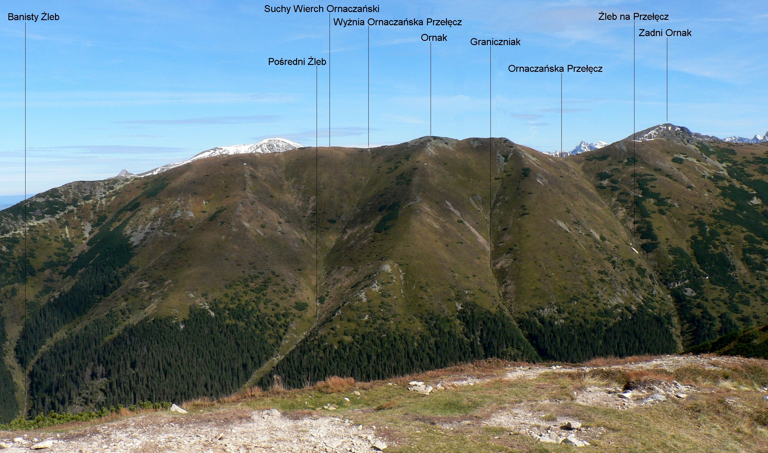 Widok z Trzydniowiañskiego Wierchu na Ornak